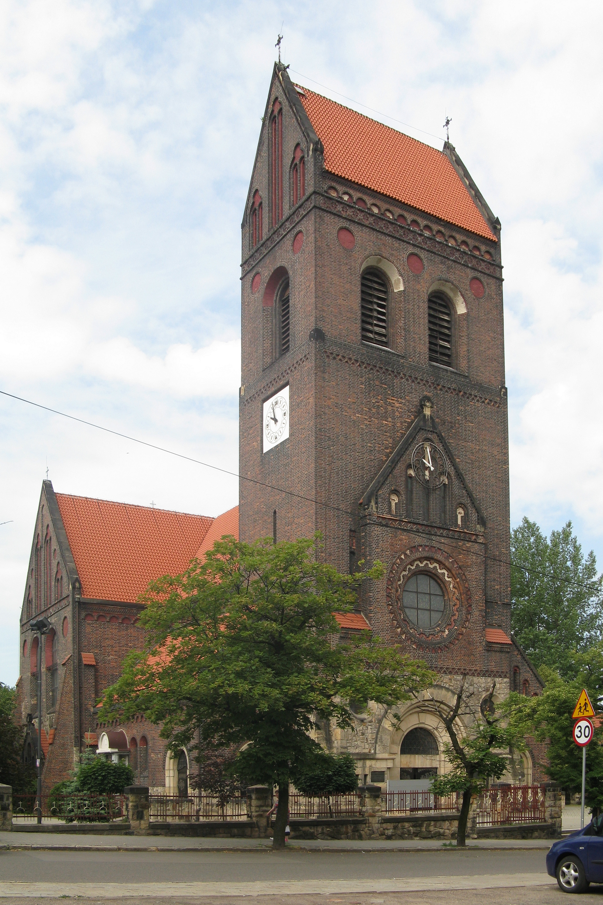 Kościół Matki Bożej Różańcowej w Świętochłowicach-Chropaczowie.